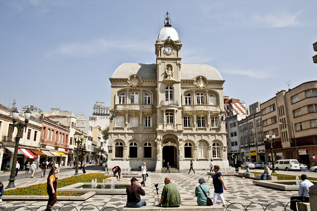 casinha